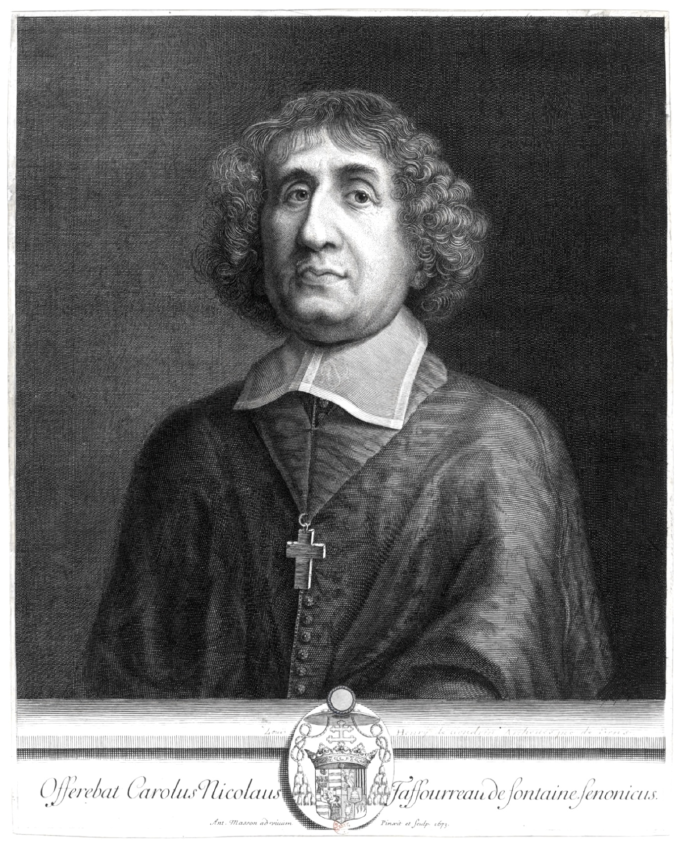 Louis-Henri de Pardaillan de Gondrin (1620–1674), archbishop of Sens.